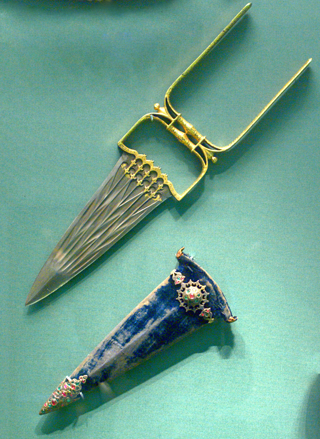 Катар, Индия, XVIII-XIX вв.